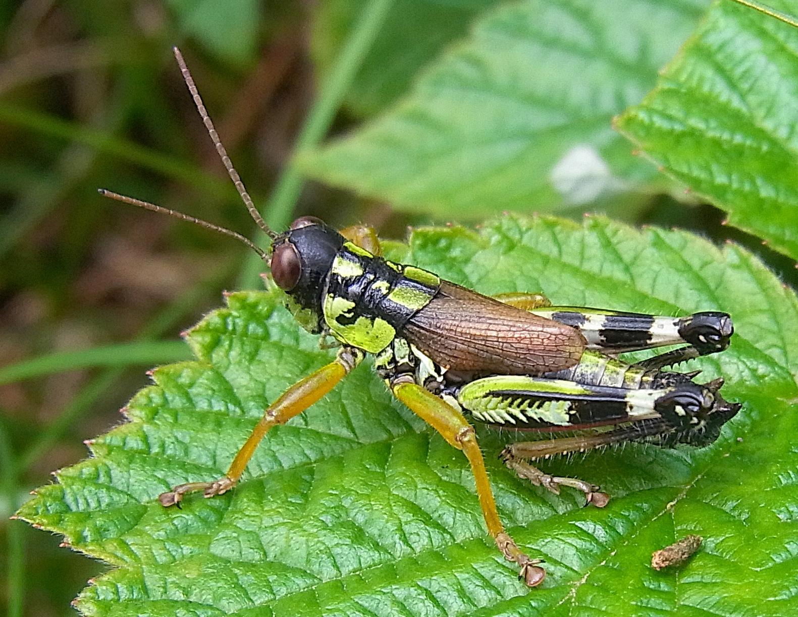 Miramella alpina collina aus Österreich, , Günser Gebirge bei Rechnitz am 3. August 2015, Männchen